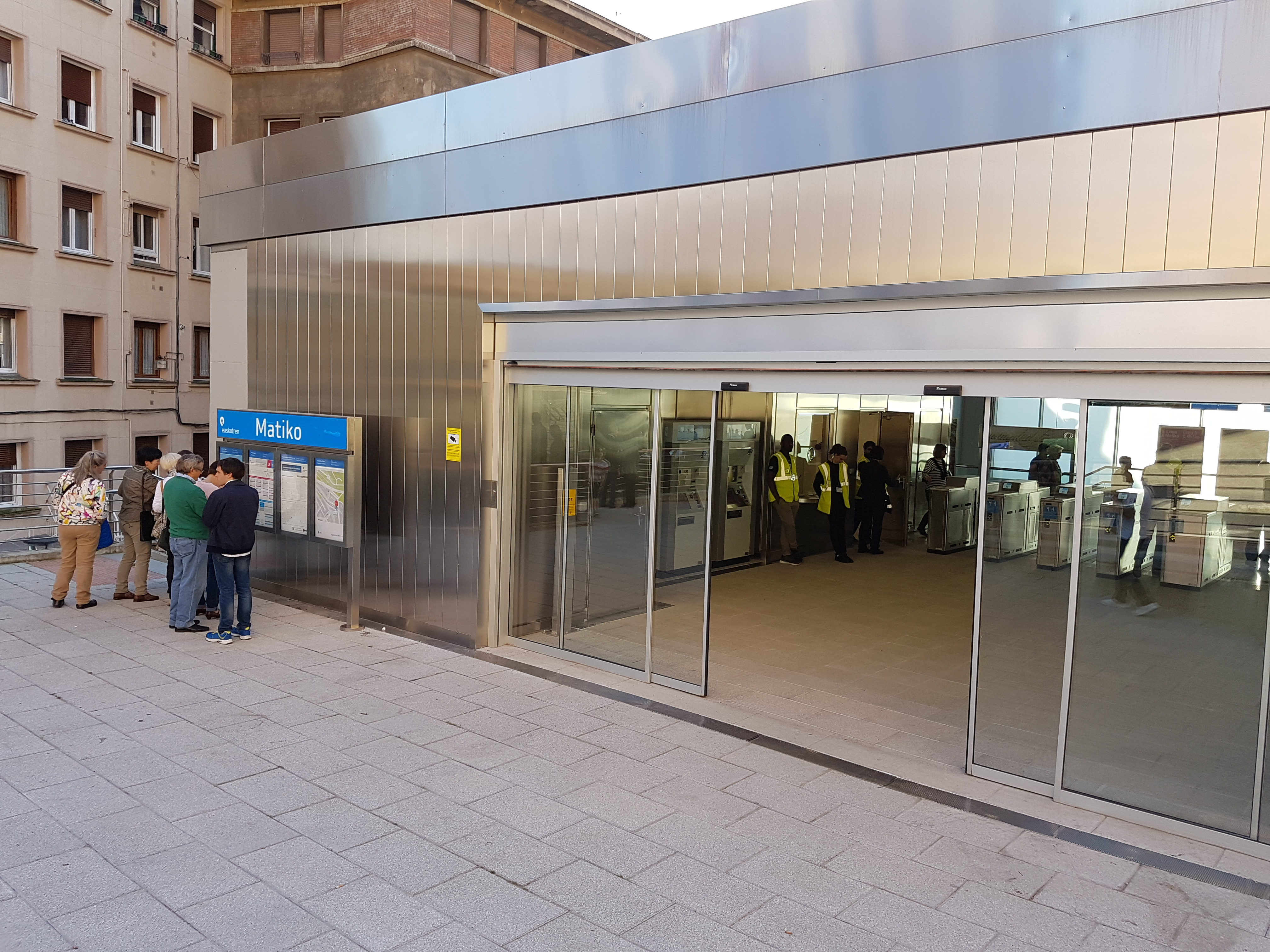 Estación de Matiko.